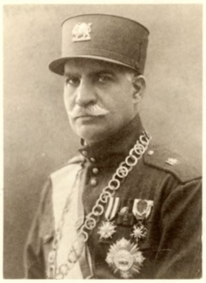 Une photo des années 30 de l'empereur d'Iran Reza Chah